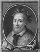 Anton Francesco Grazzini, detto il Lasca (1503-1584), incisione di F.Rosaspina